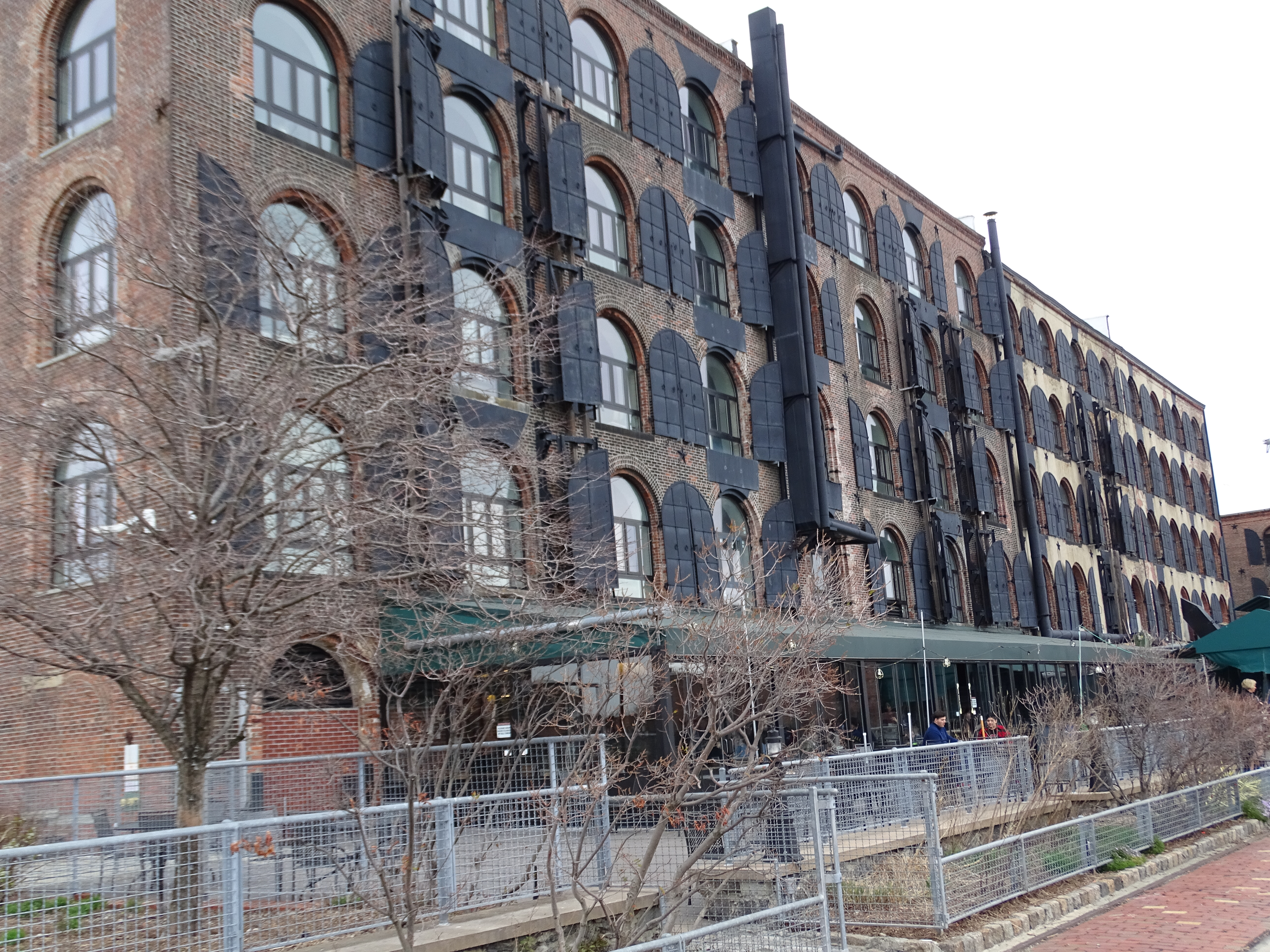 Red Hook Stores (Red Hook, Brooklyn, NY, USA), Ansicht der Gebäuderückwand (Seite zum Hafen); vorn unten sieht man ein Caffee, das zur Ladenkette Fairway gehört